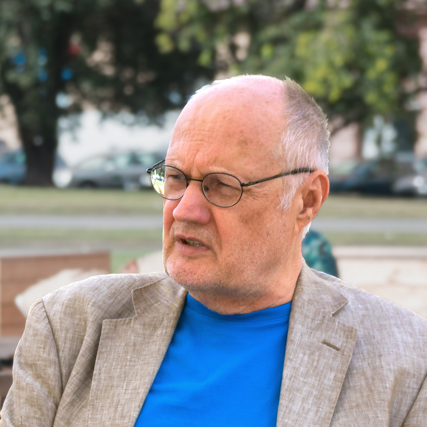 Filozof Václav Bělohradský na Vítězném náměstí v Praze.